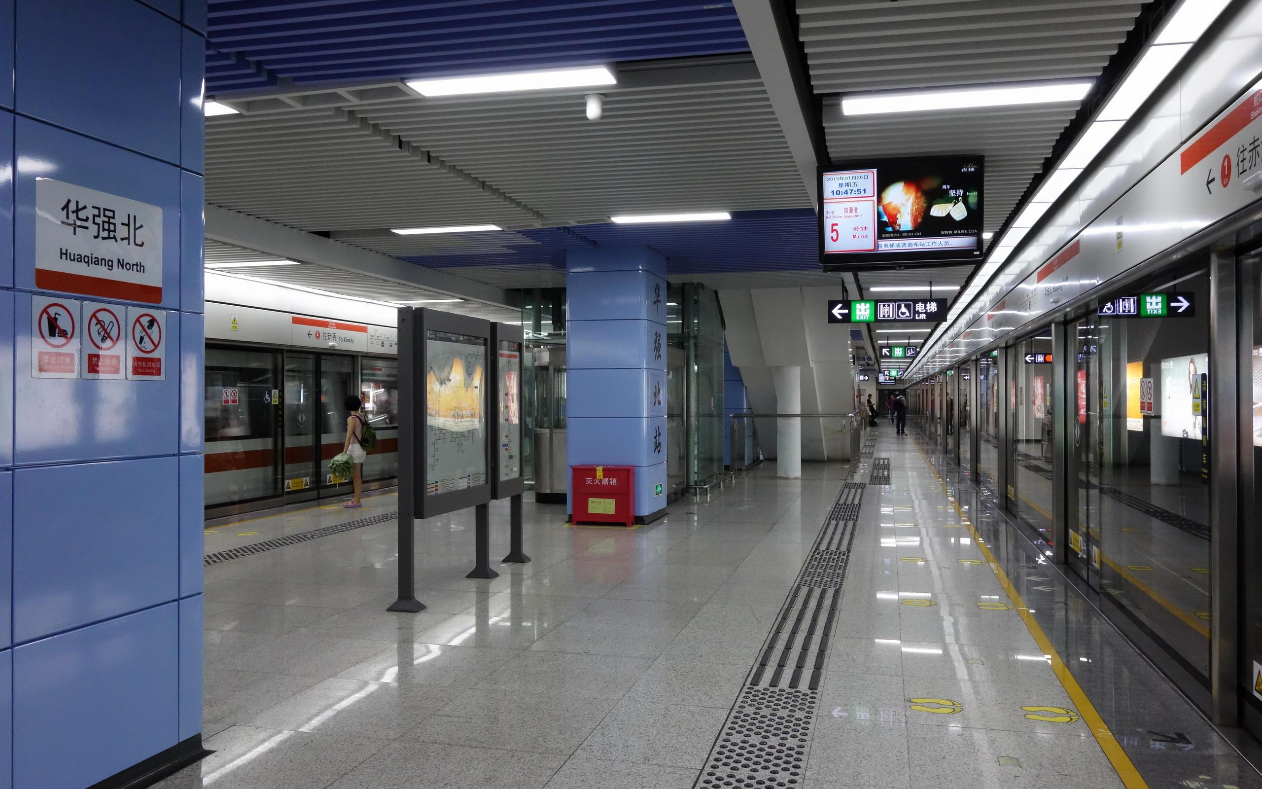 深圳地铁蛇口线华强北站站台